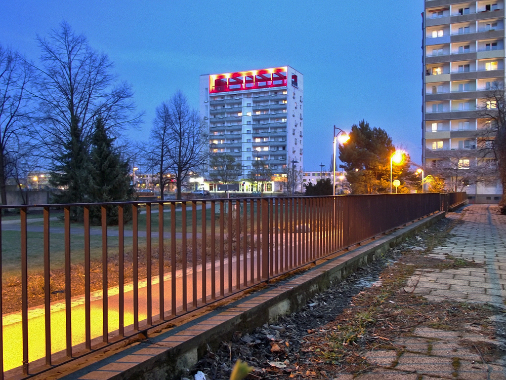 Lausitz-Tower im Stadtzentrum von Hoyerswerda